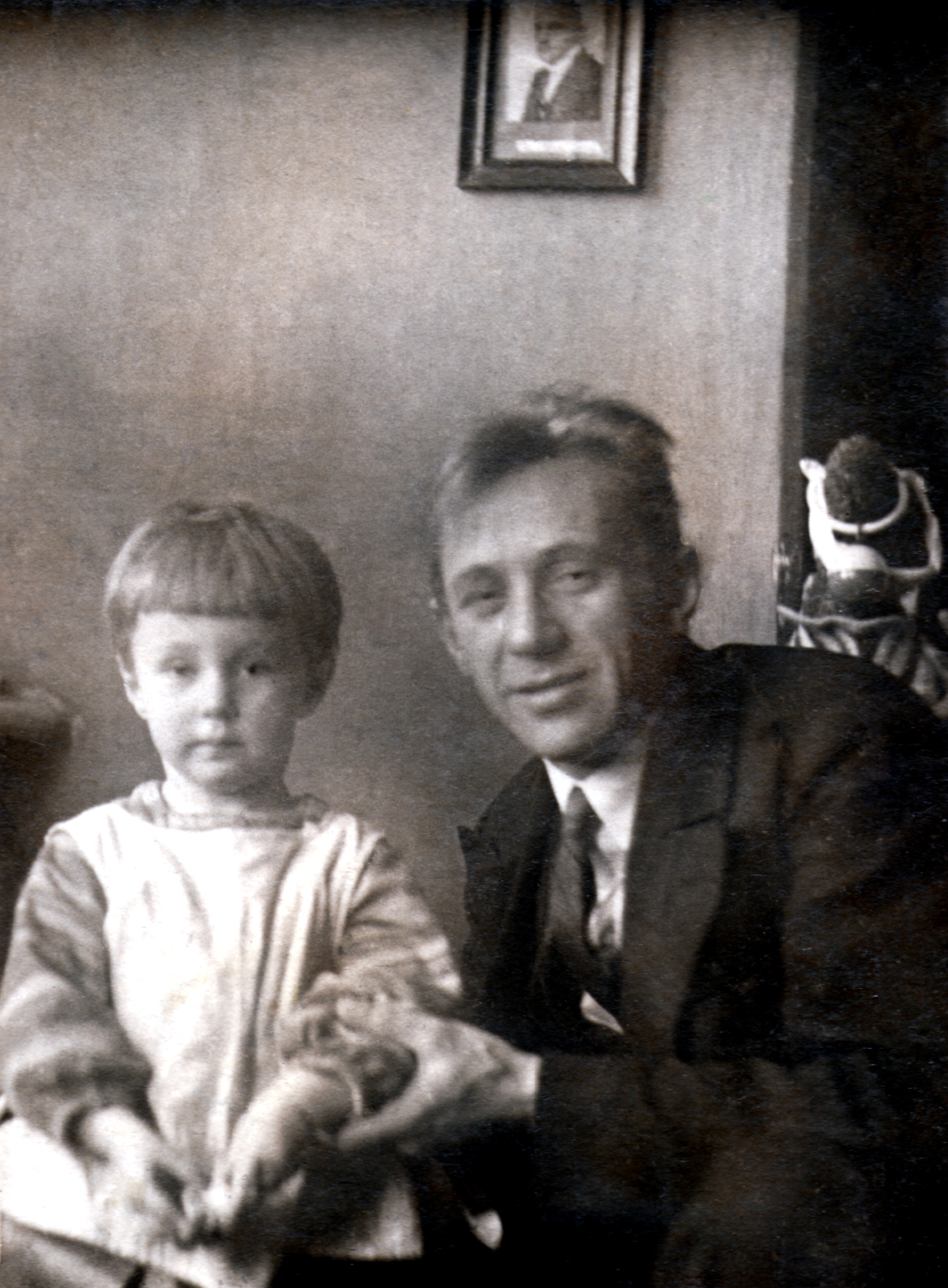 Сергей Иванович Маркин с Дочерью Светланой